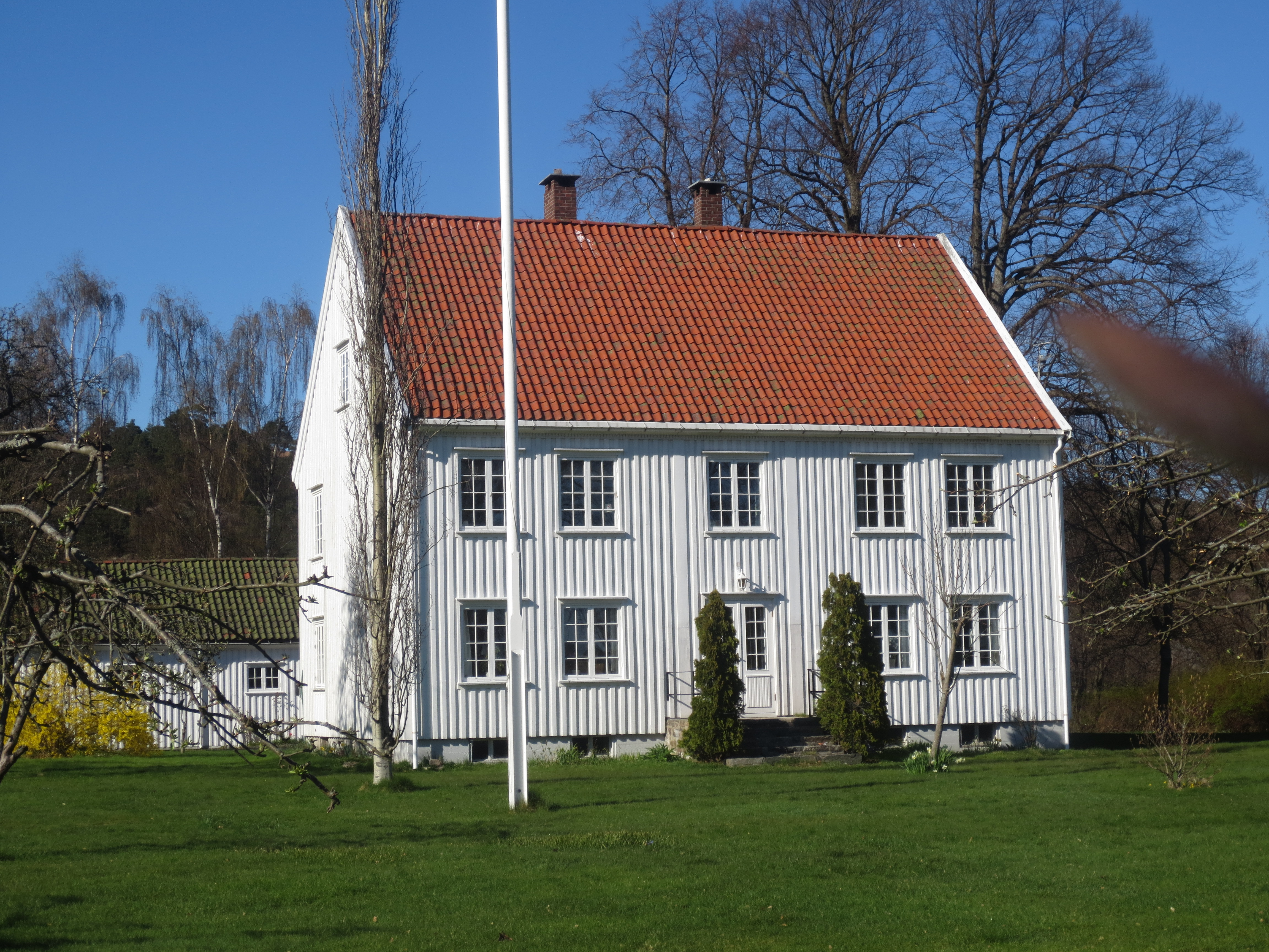 Oddernes prestegård, under Oddernes kirke, Kristiansand